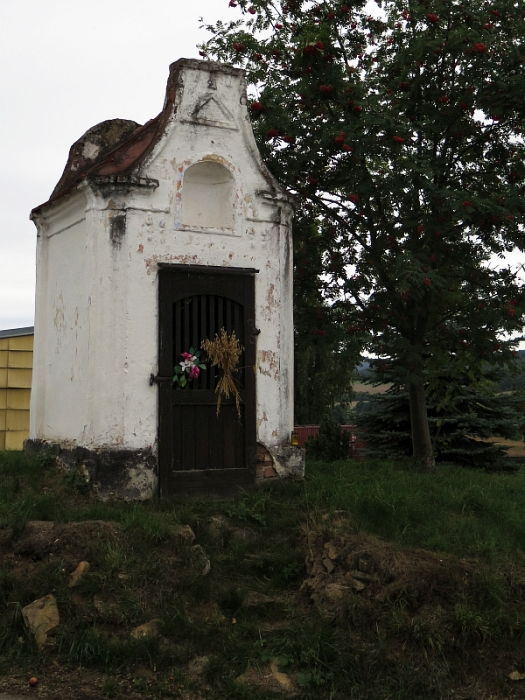 Kaplička, západní okraj obce při silnici na Těšovice, Běleč (Těšovice).